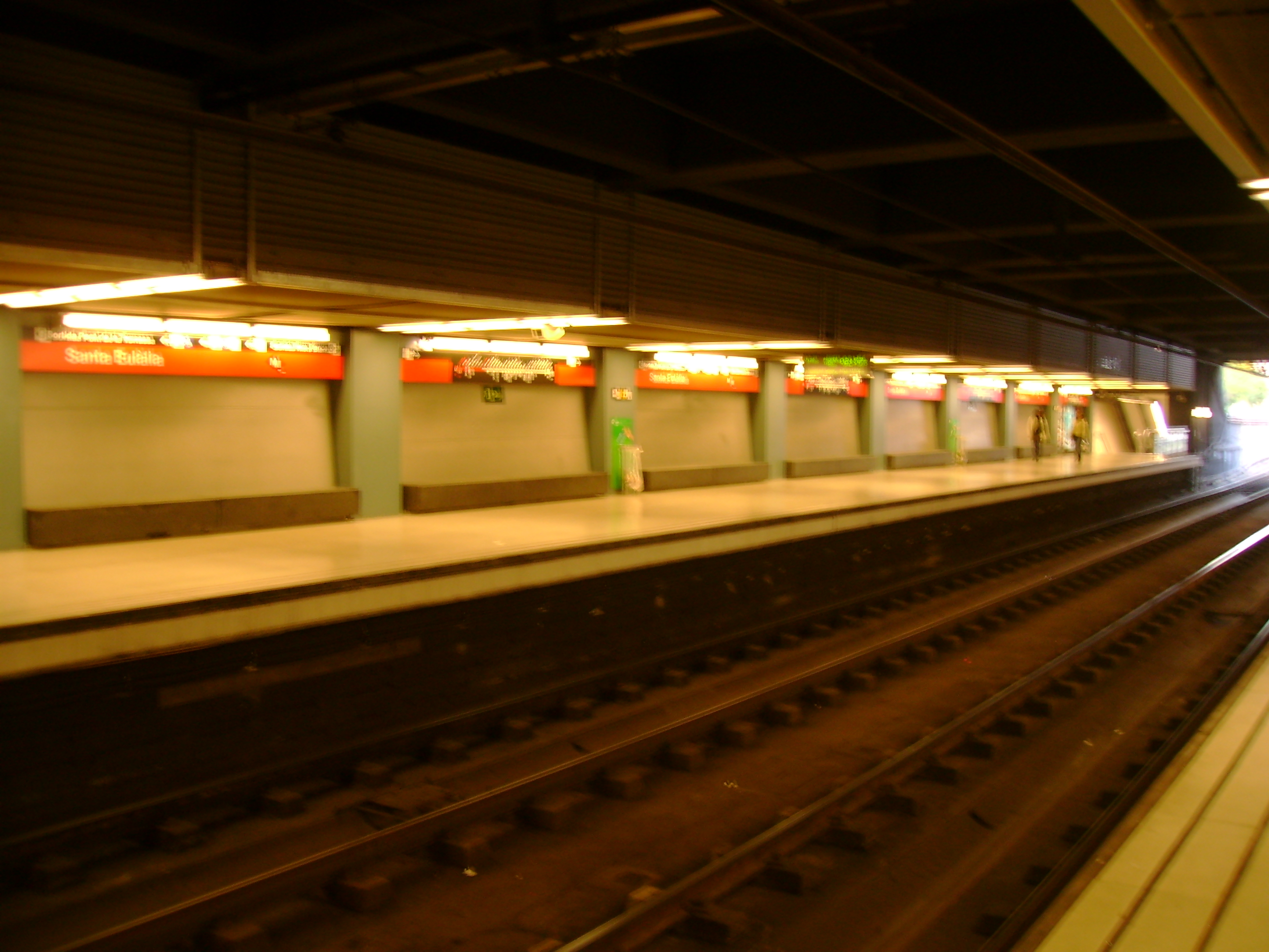 Foto capturada per la meva càmara a l'estació de Santa Eulàlia (Metro de Barcelona).